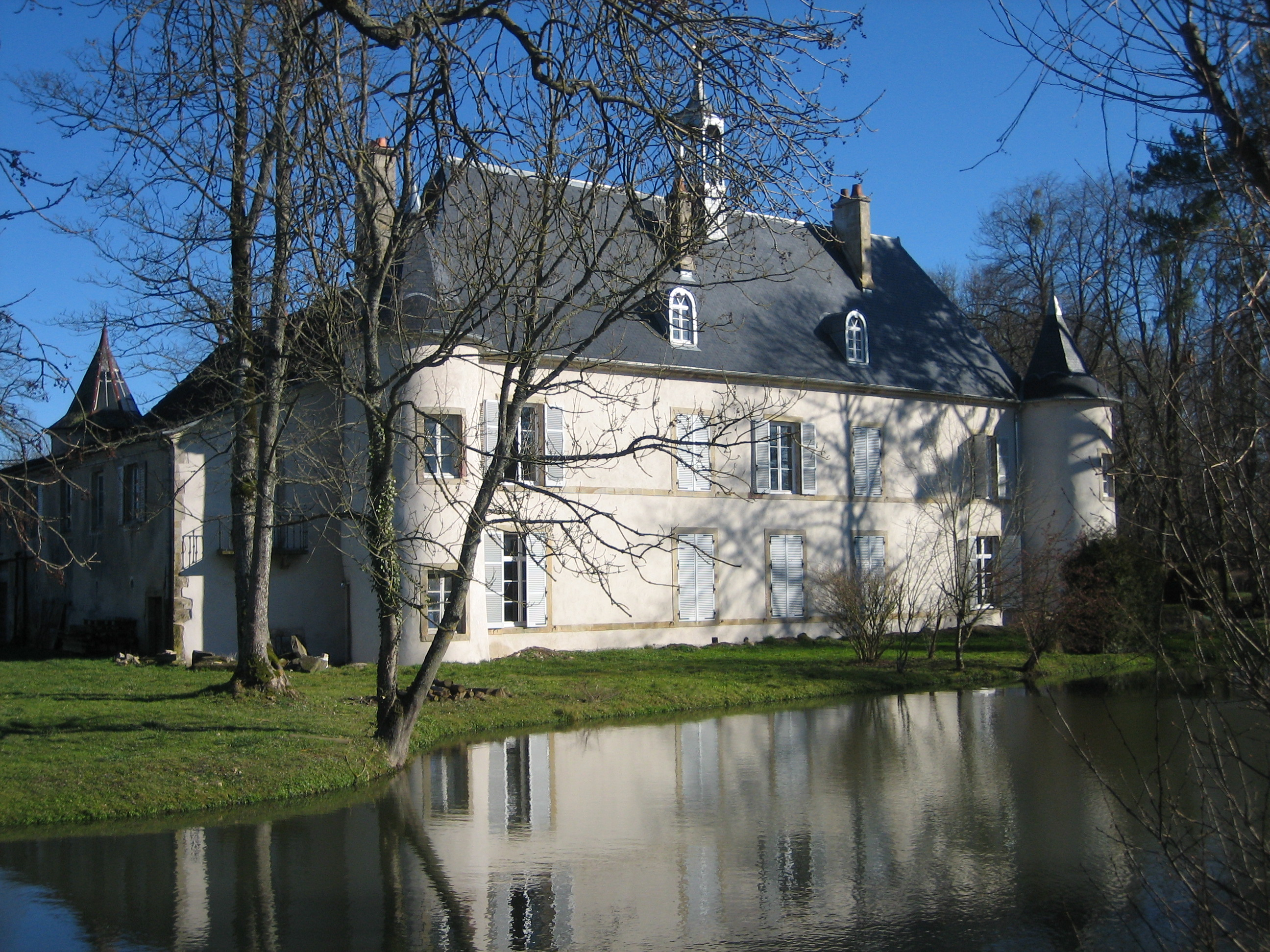 Vue du château de Girecourt-sur-Durbion (Vosges) par Raphaël Tassin (raphdvoj) le 4 février 2007